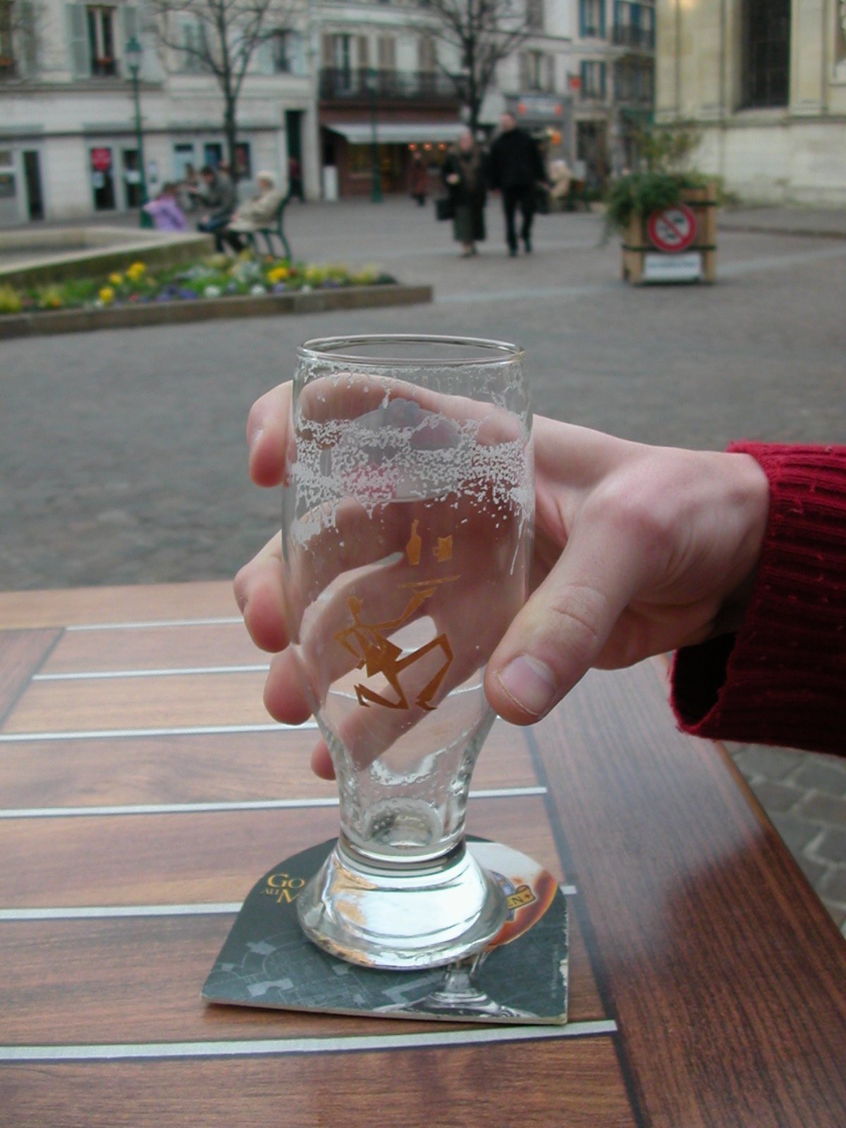 Sur une terrasse de Rueil-Malmaison un après-midi de février. Avec la main de Benjism89.